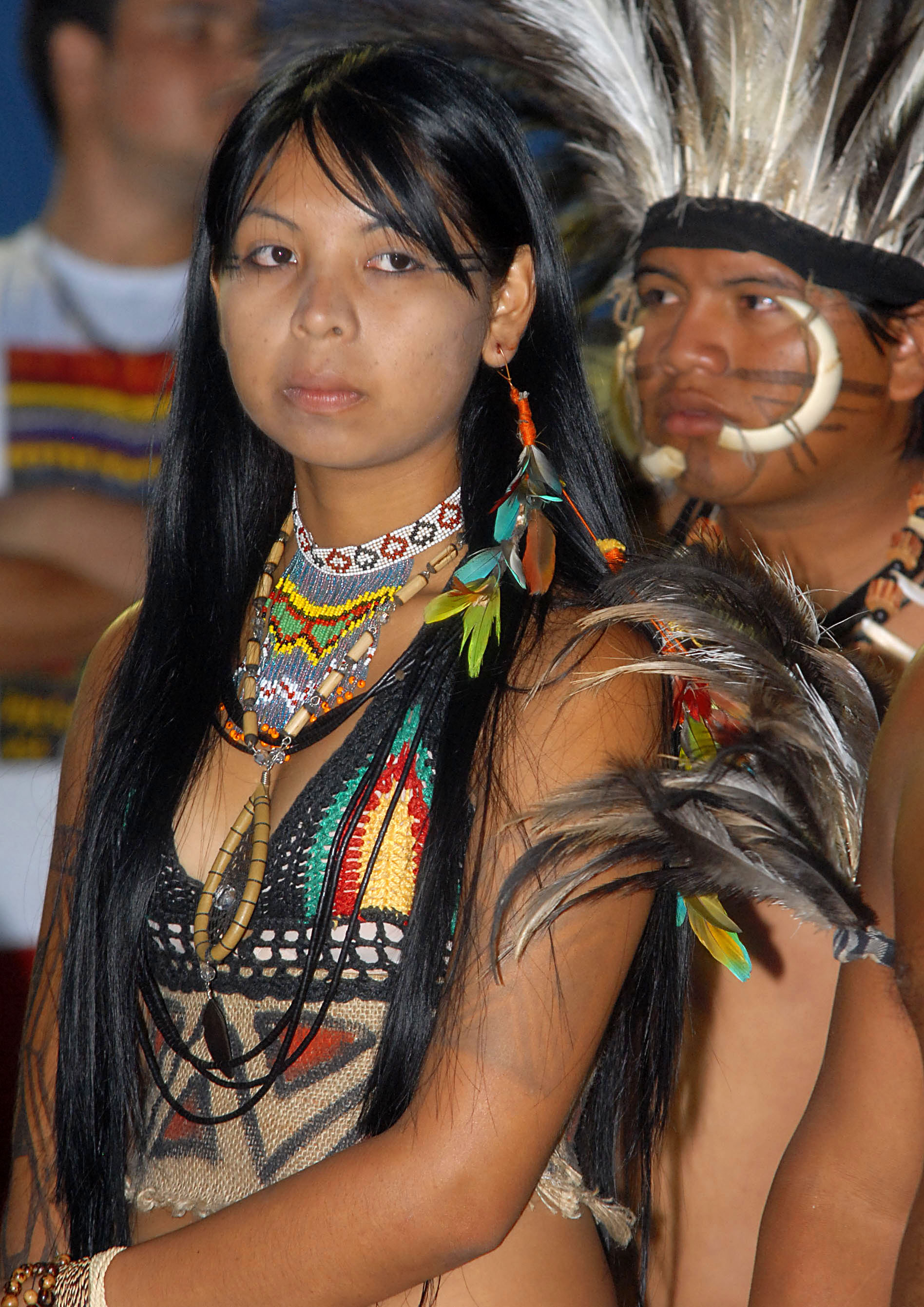 India da etnia Terena na cerimônia de encerramento da nona edição dos Jogos dos Povos Indígenas (Olinda PE)